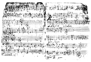 «Полацкі сшытак». ХVІІ ст. Старонкі 59v-60t.